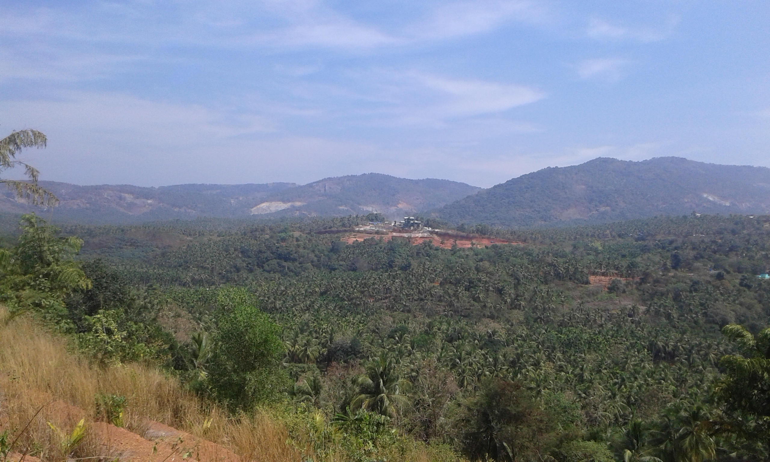 ഊരകം മല , മലപ്പുറം